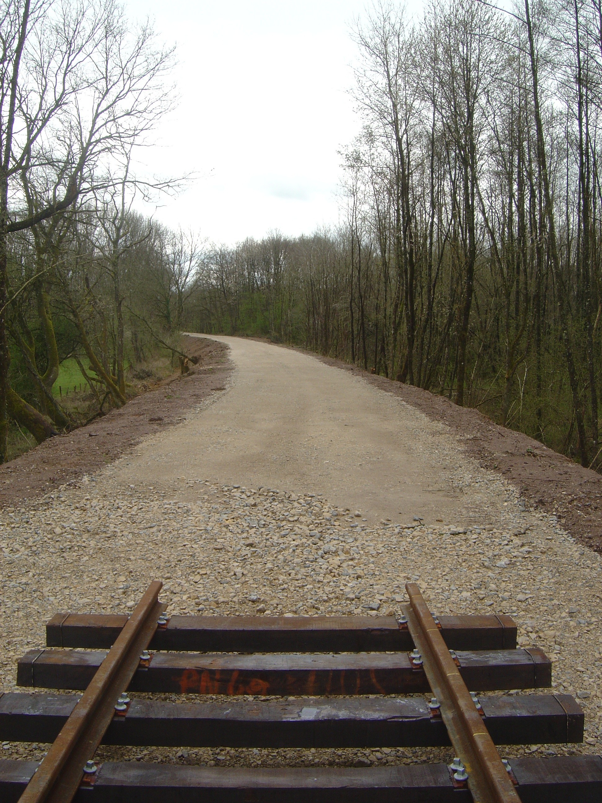 Travaux voie ferrée Lure Villersexel